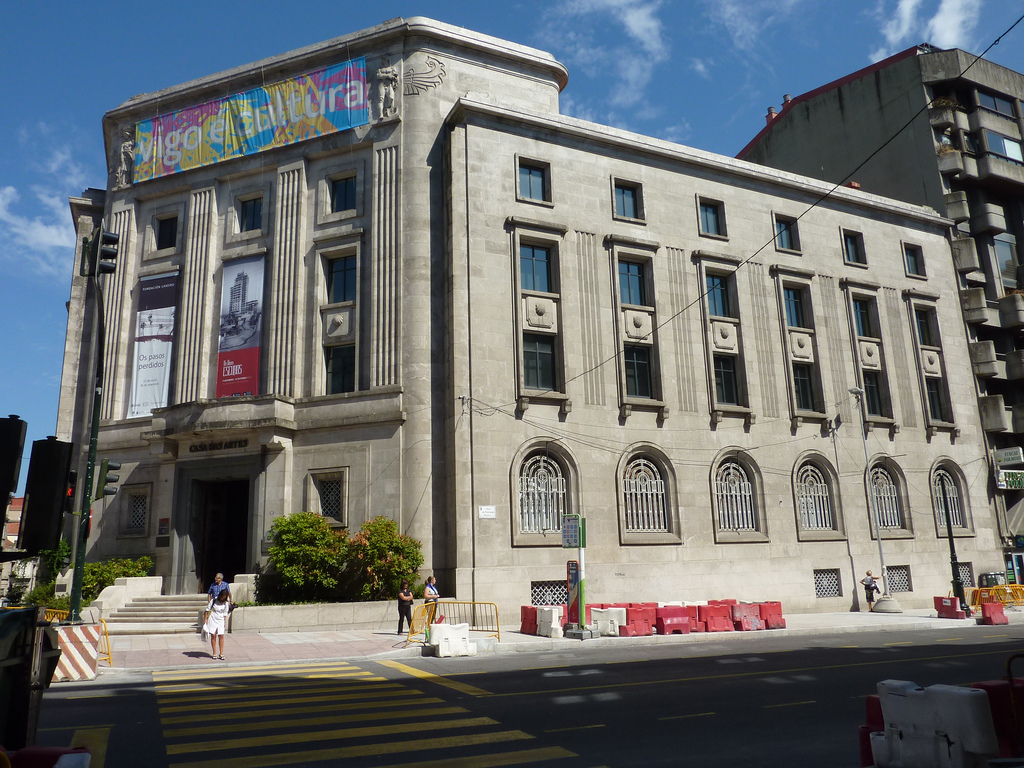 vista general del edificio "Casa das artes" en cuyo interior, concretamente en la tercera planta, se encuentra la sede de la Fundación Laxeiro.